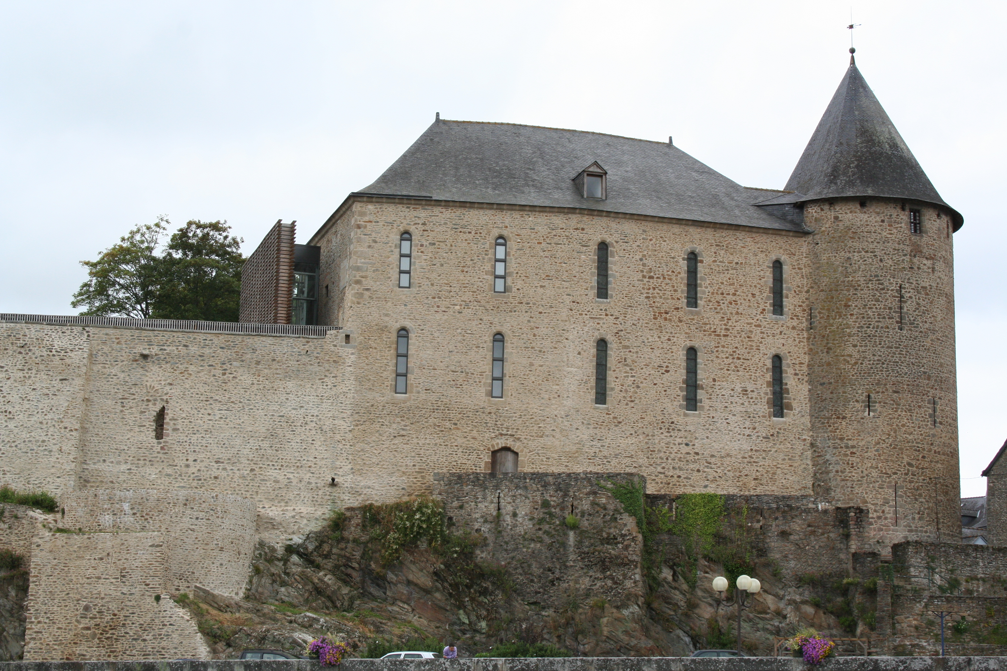 Vue du château de Mayenne à partir du quai.